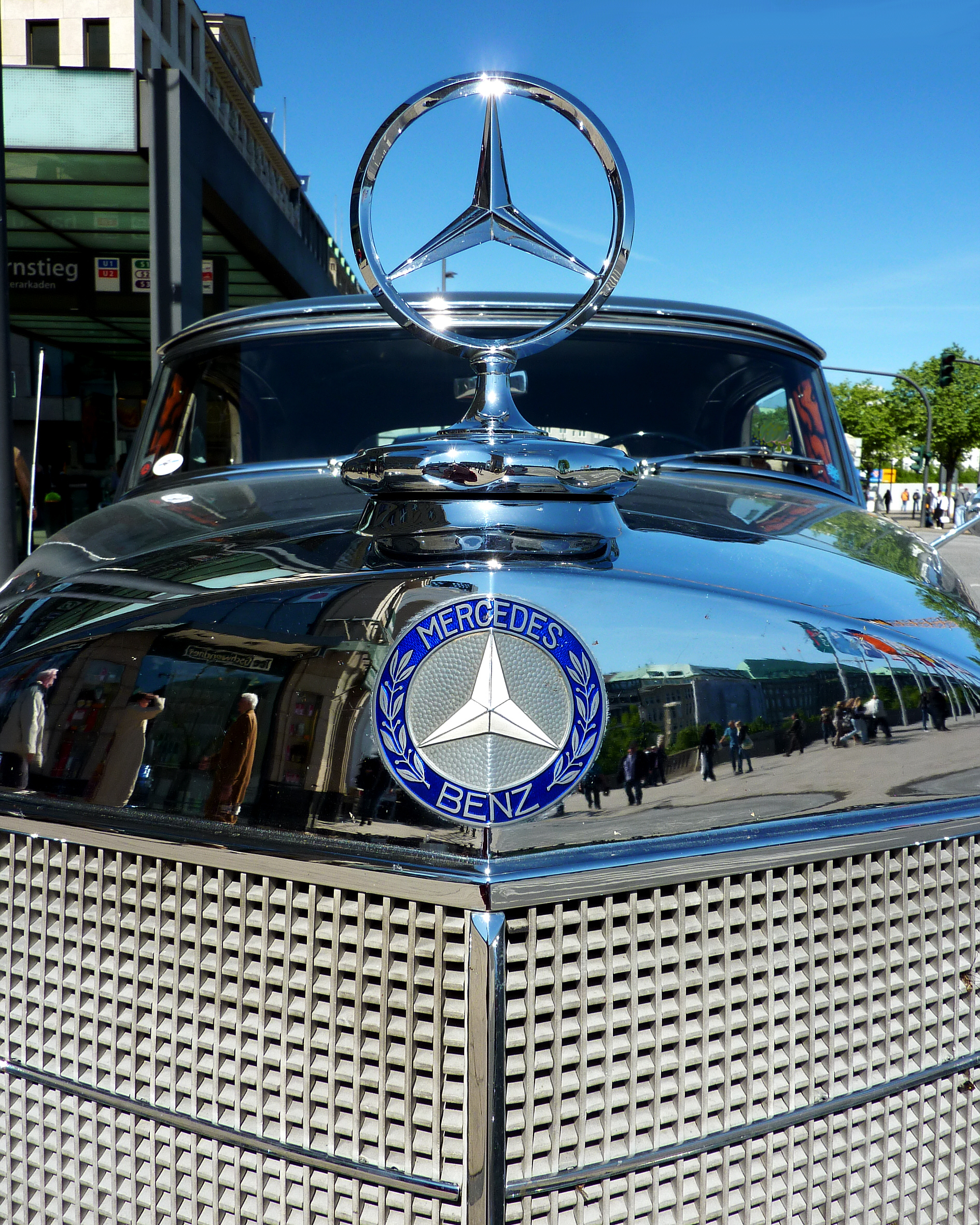 Stern und Enblem eines Mercedes Benz Oldtimers.